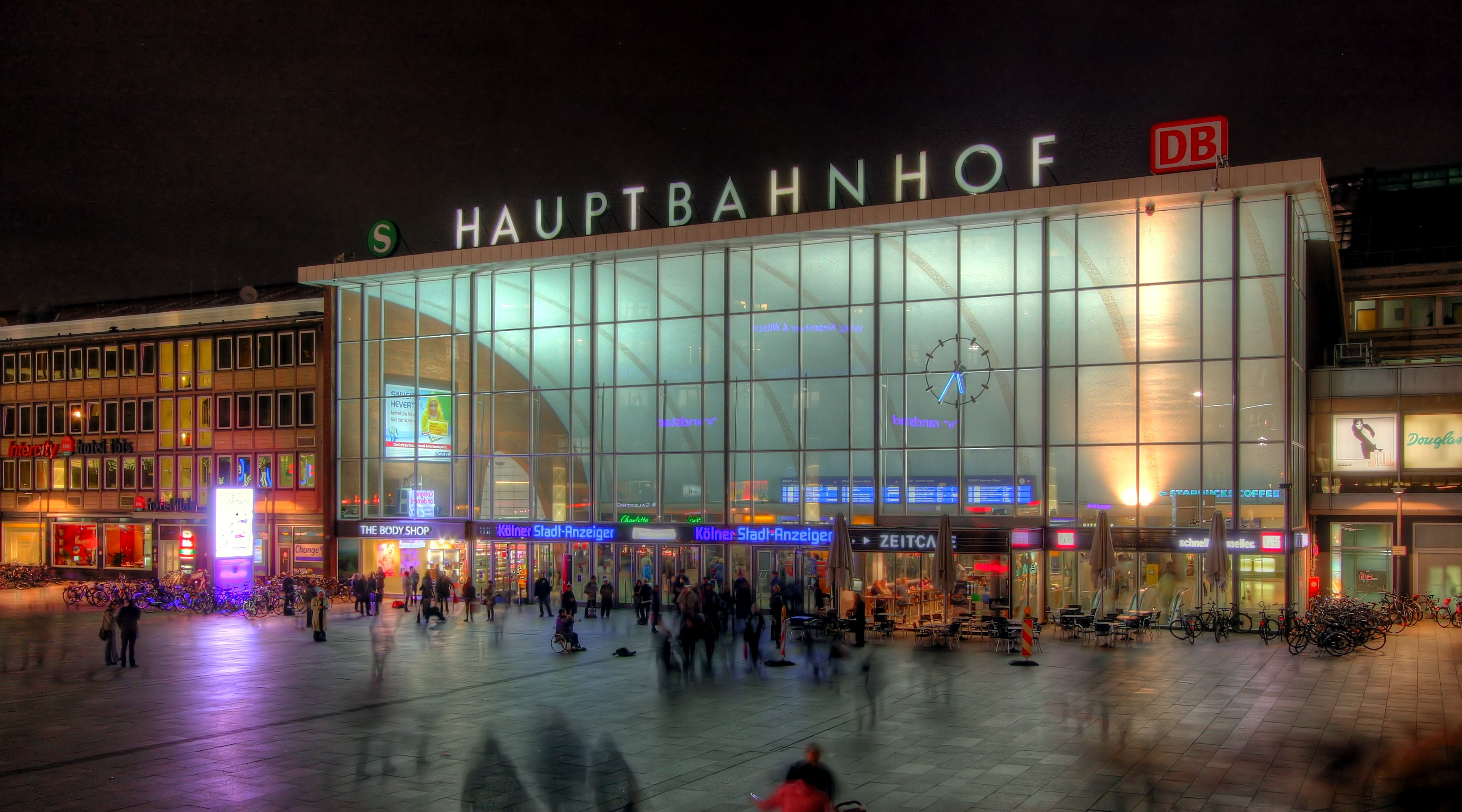 Hauptbahnhof Köln - Empfangsgebäude bei Nacht